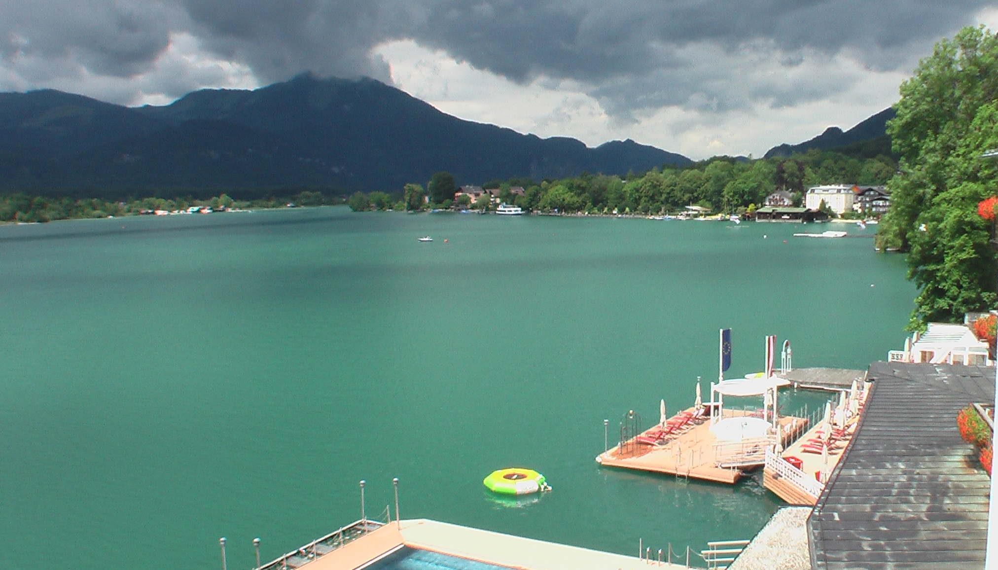 Sankt Wolfgang im Salzkammergut: Wolfgangsee